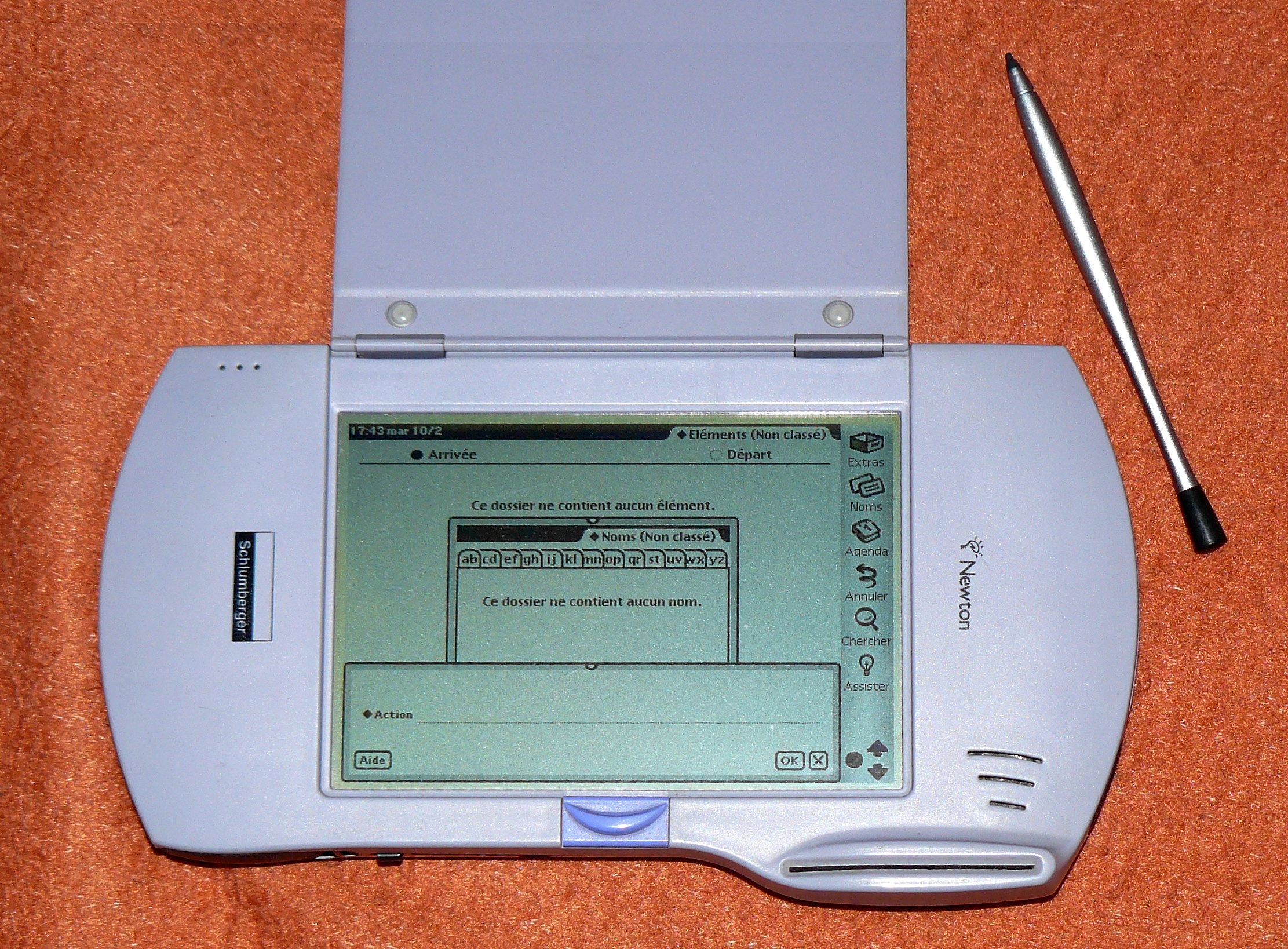 Messagepad "Newton" par Schlumberger" - série conçue pour les médecins français et commercialisée également sous le nom "Watson". Logiciel OS2 en français et système de lecture de "Carte Vitale" (vers 1997)